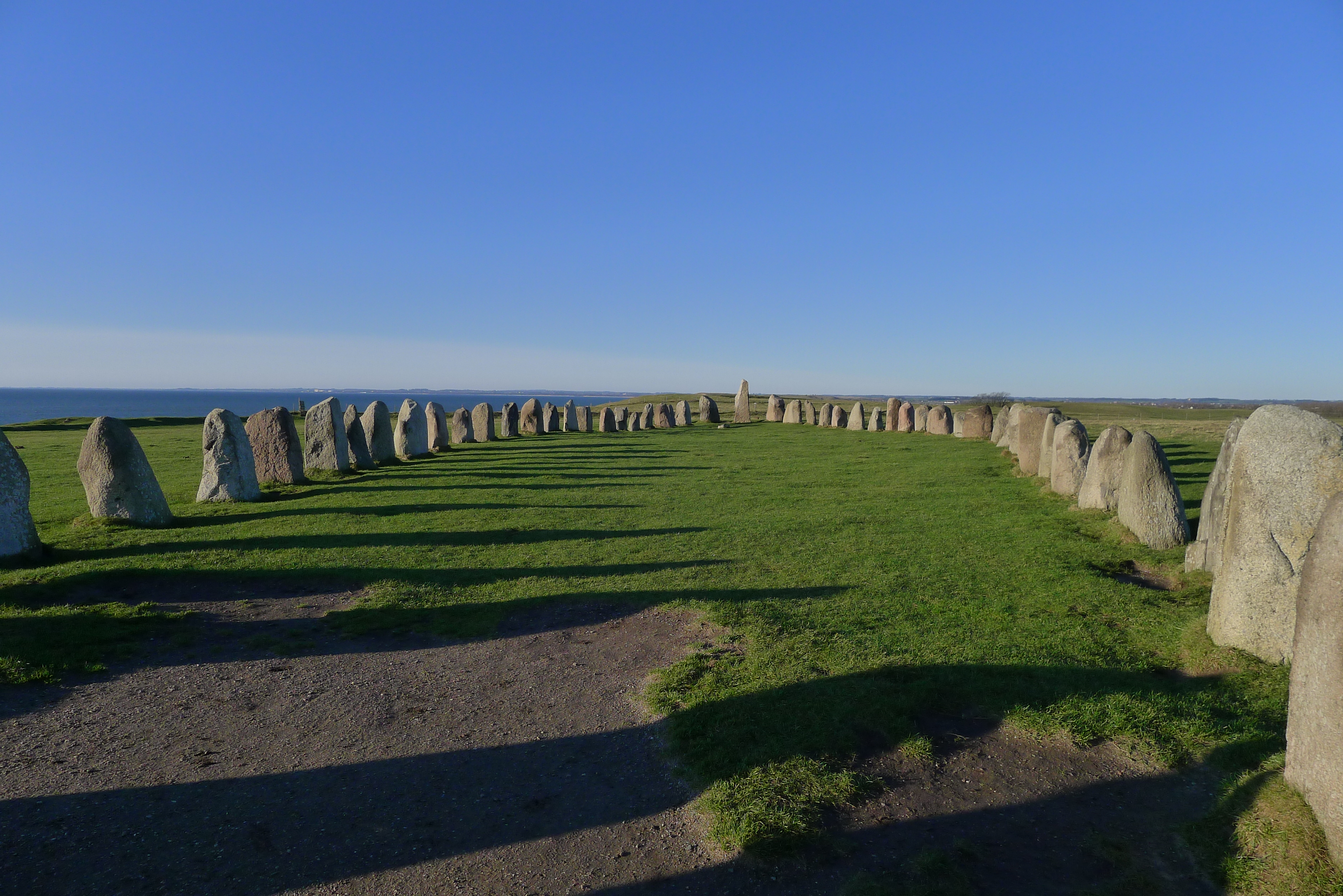 Ales stenar i Kåseberga